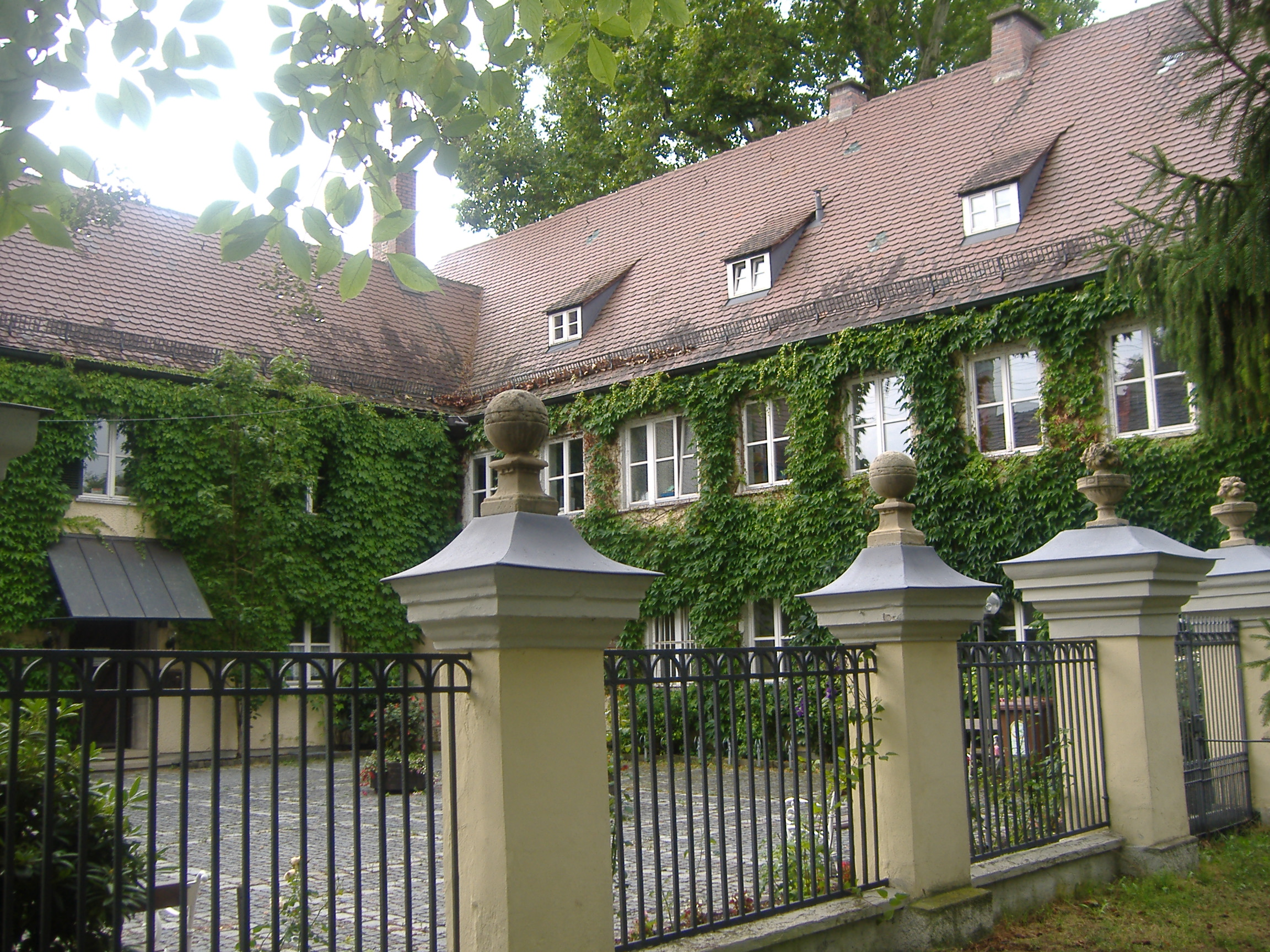 Hofseite des Fugger-Schlösschens in Göggigen